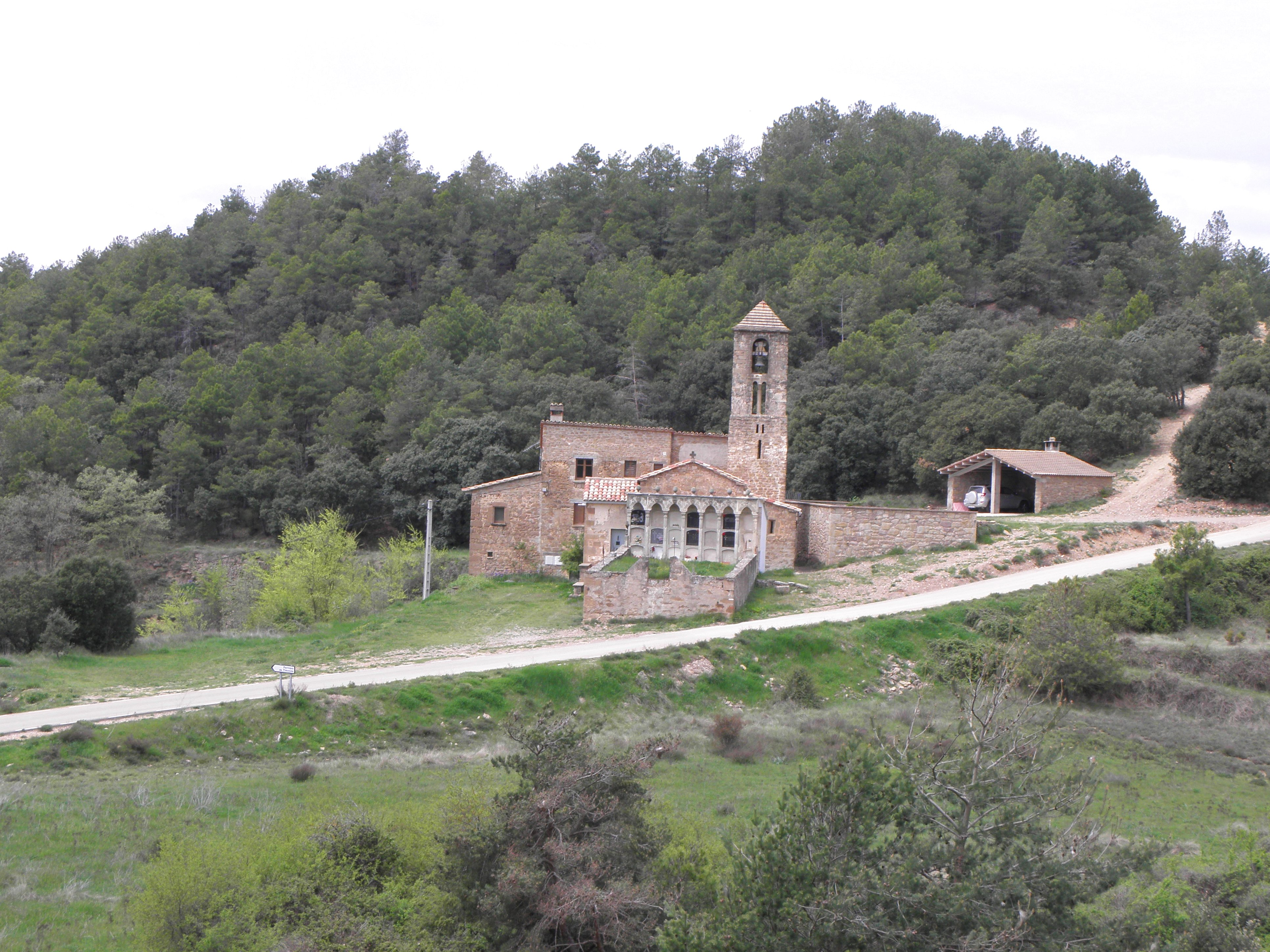 La parròquia de Santa Eulàlia de Timoneda, al municipide Lladurs (Solsonès)